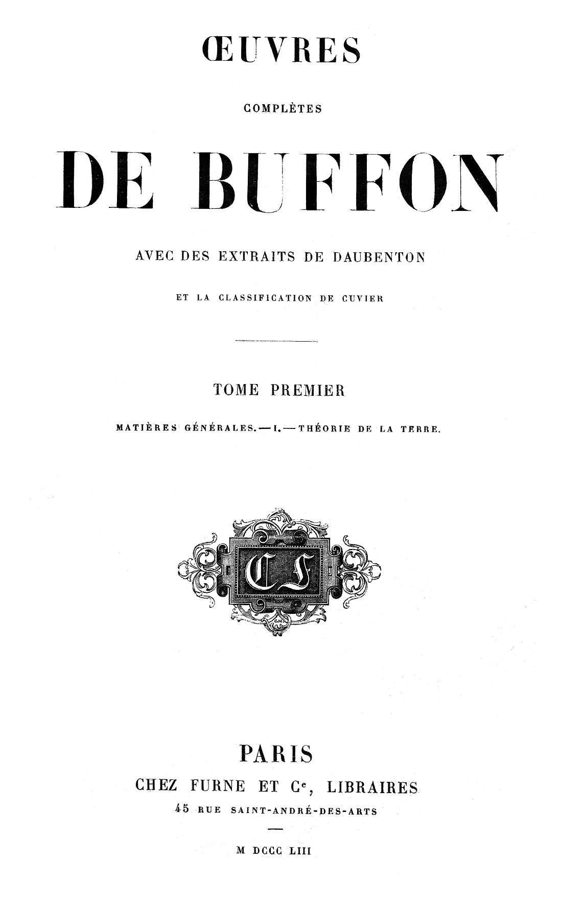 Титульный лист 1 т. Полного собрания сочинений Бюффона, 1853 г.